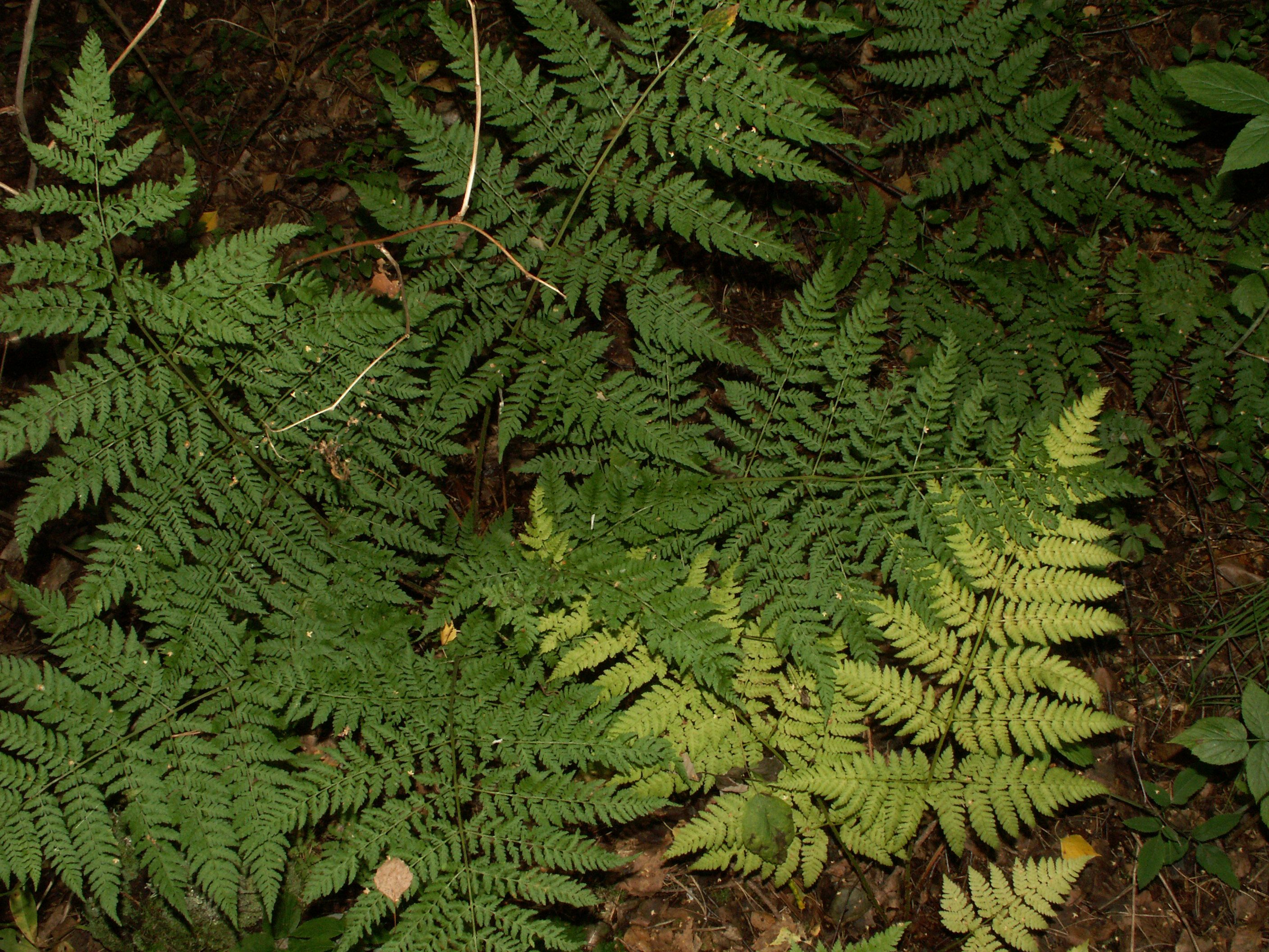 Dryopteris dilatata, Litauen, Schwarzerlen-Fichten-Wald